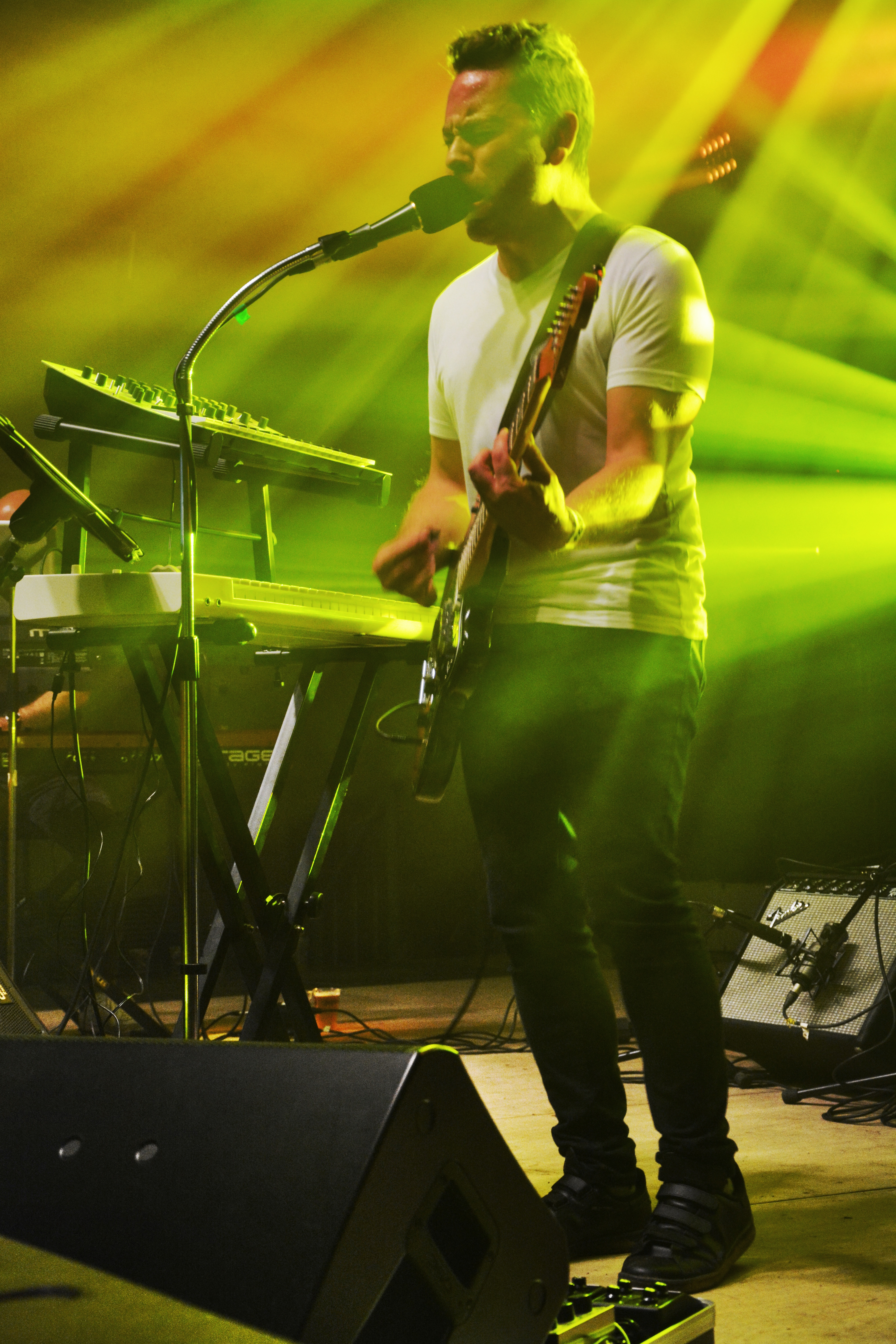 Tijdens optreden van Jim Cole